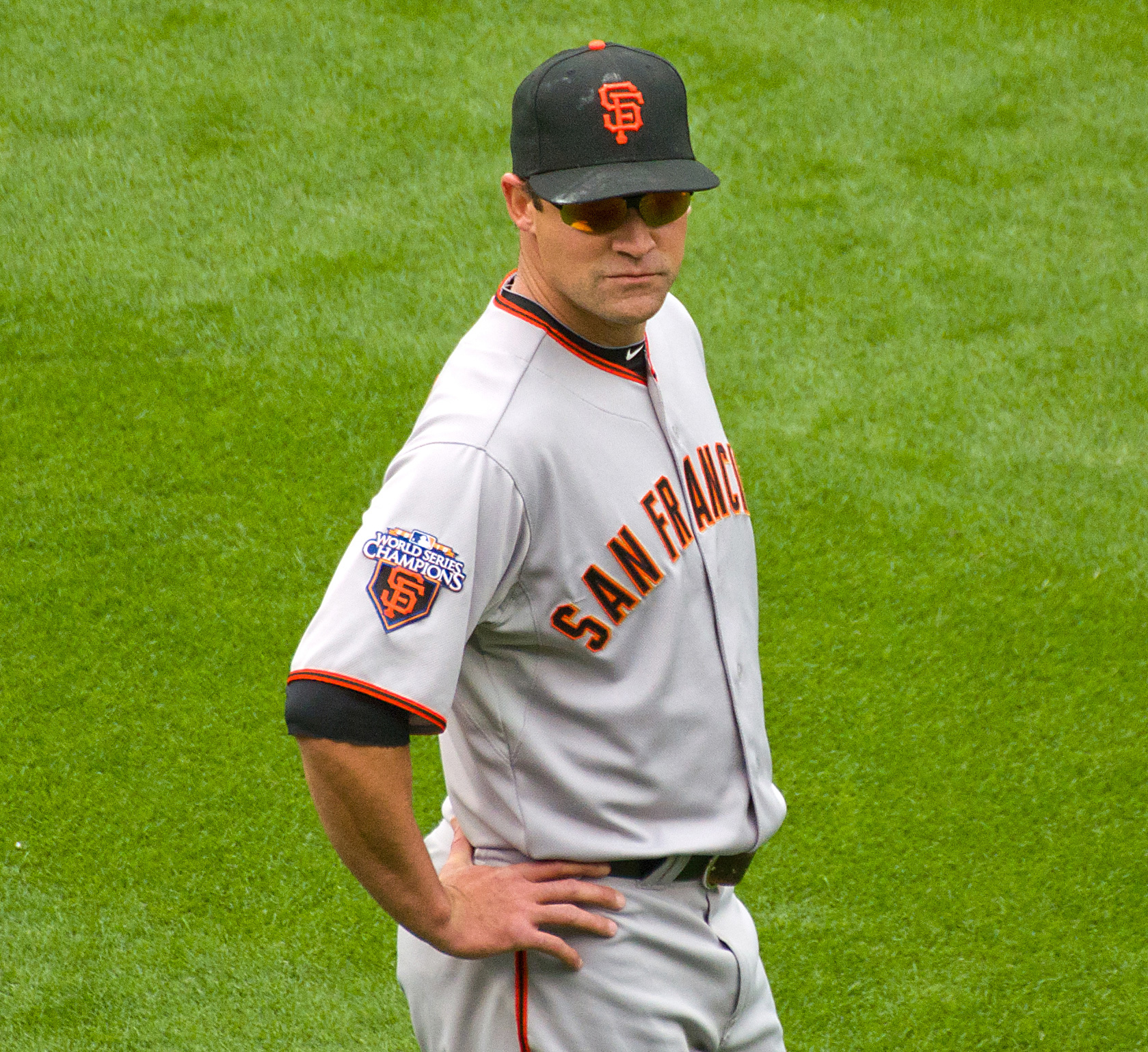 Pat Burrell